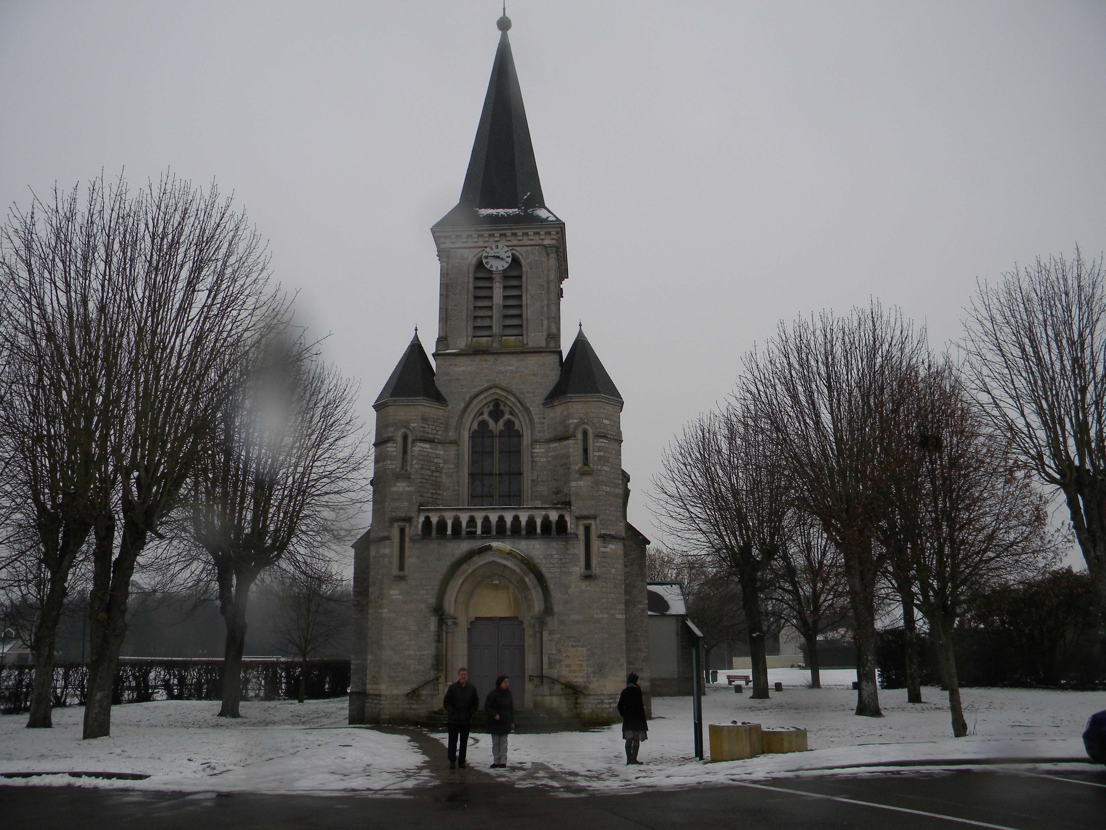 preĝejo de Varois